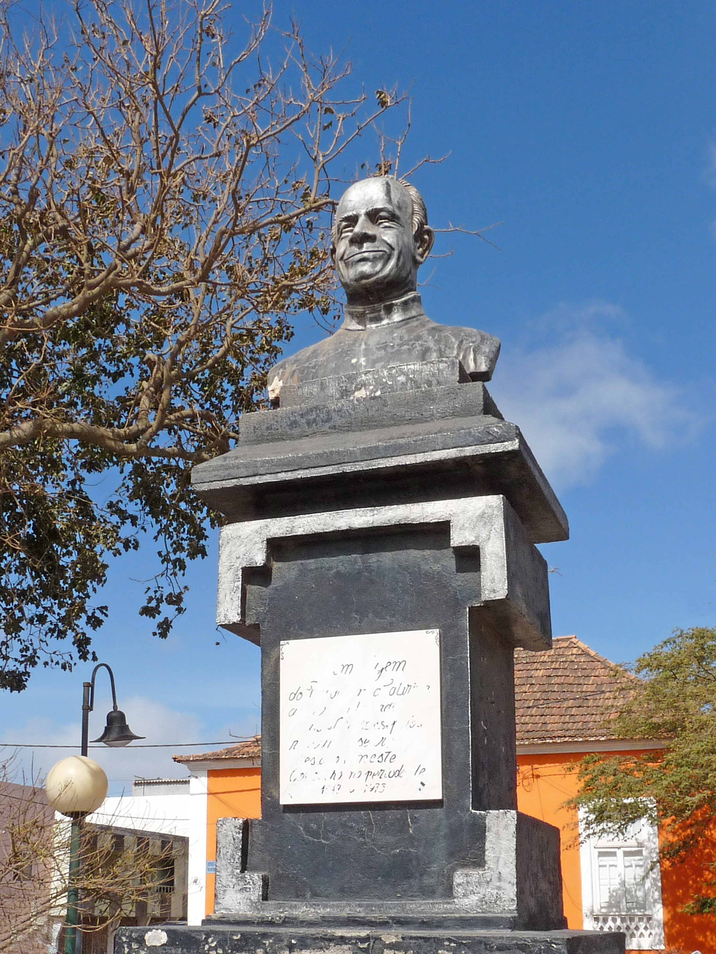 Assomada (île de Santiago, Cap-Vert) : monument (?)